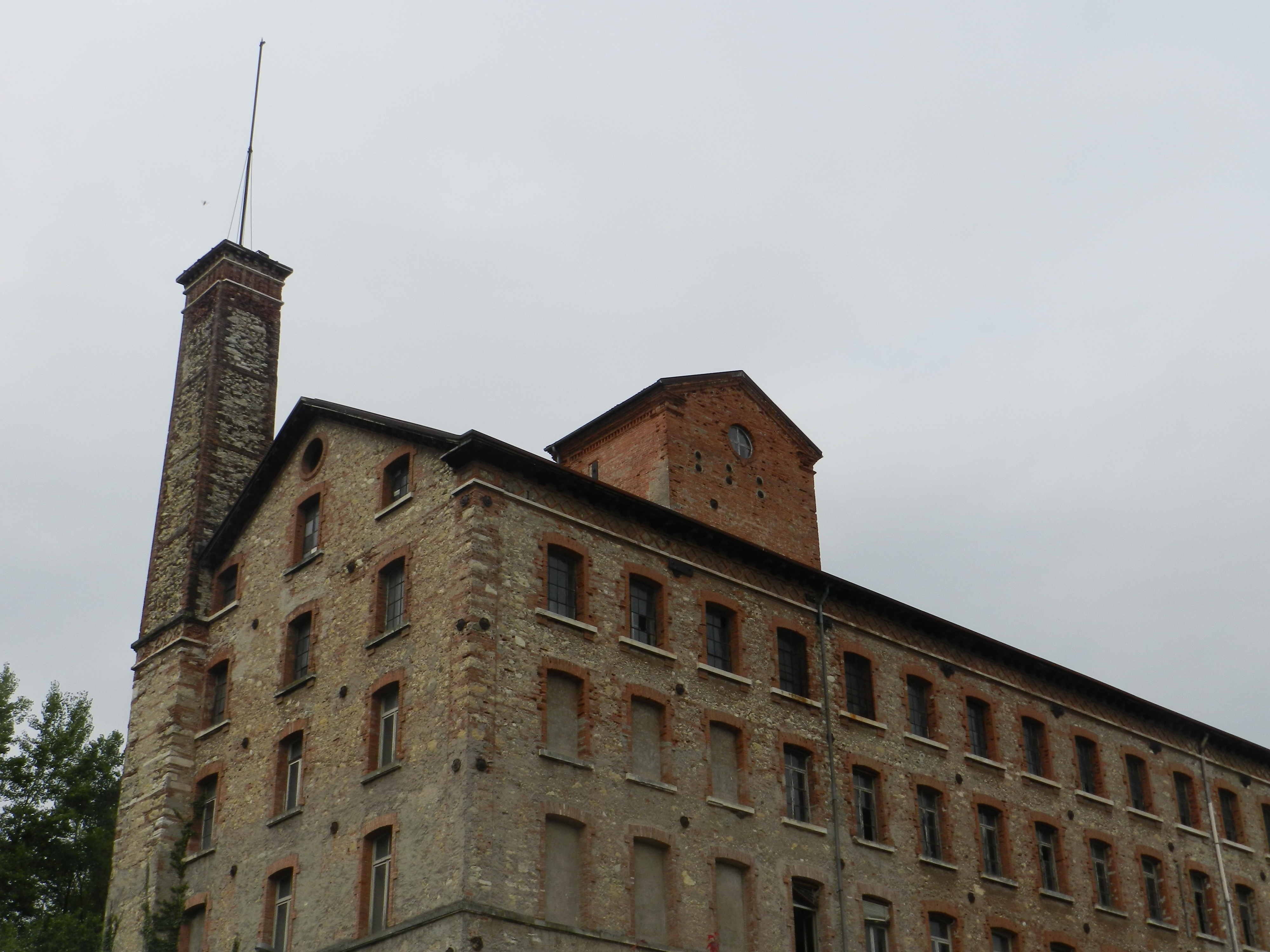 Edificio "Fabbrica Alta" - Area ex Lanerossi This is a photo of a monument which is part of cultural heritage of Italy.